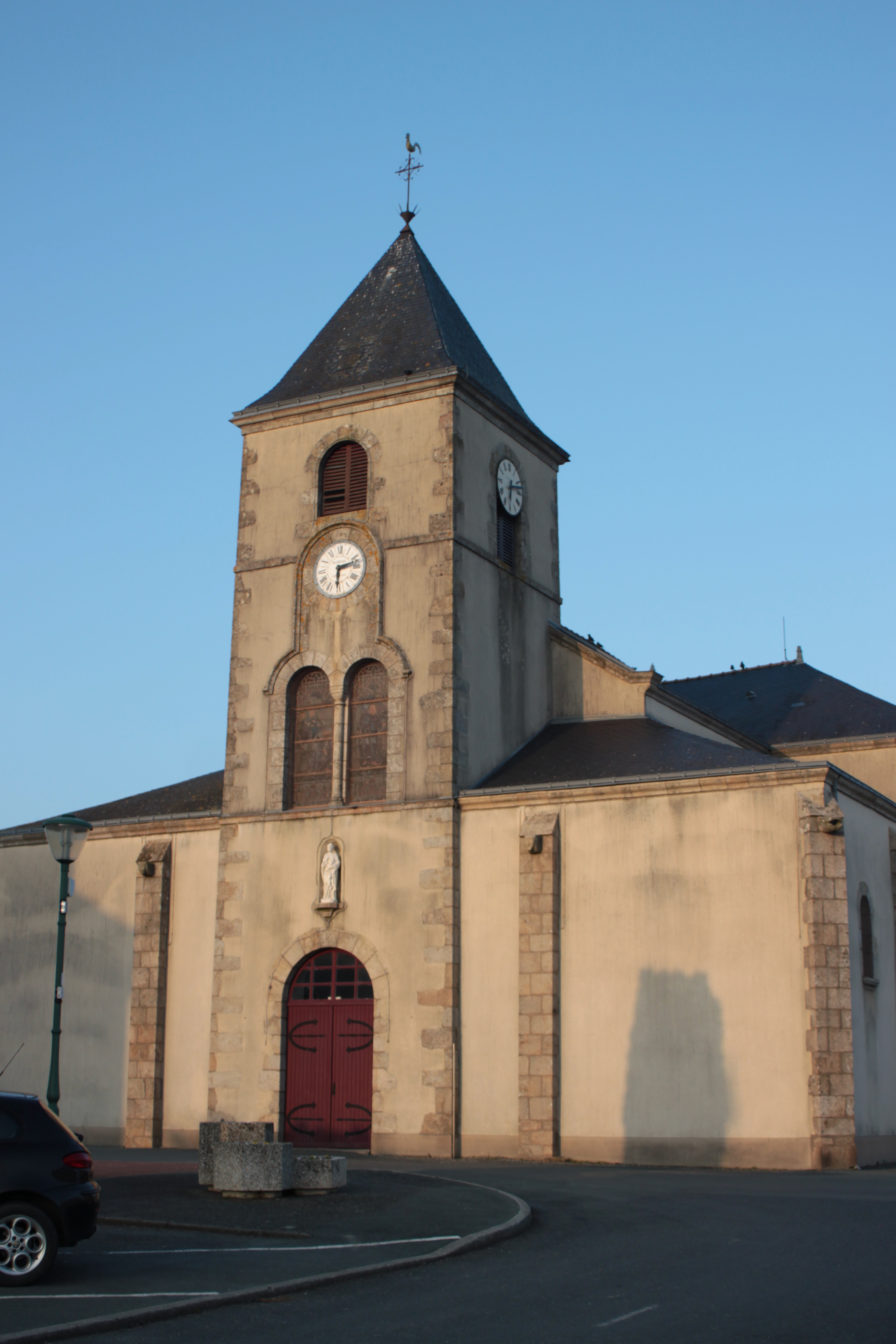 Église, Fr-85-la Guyonnière.